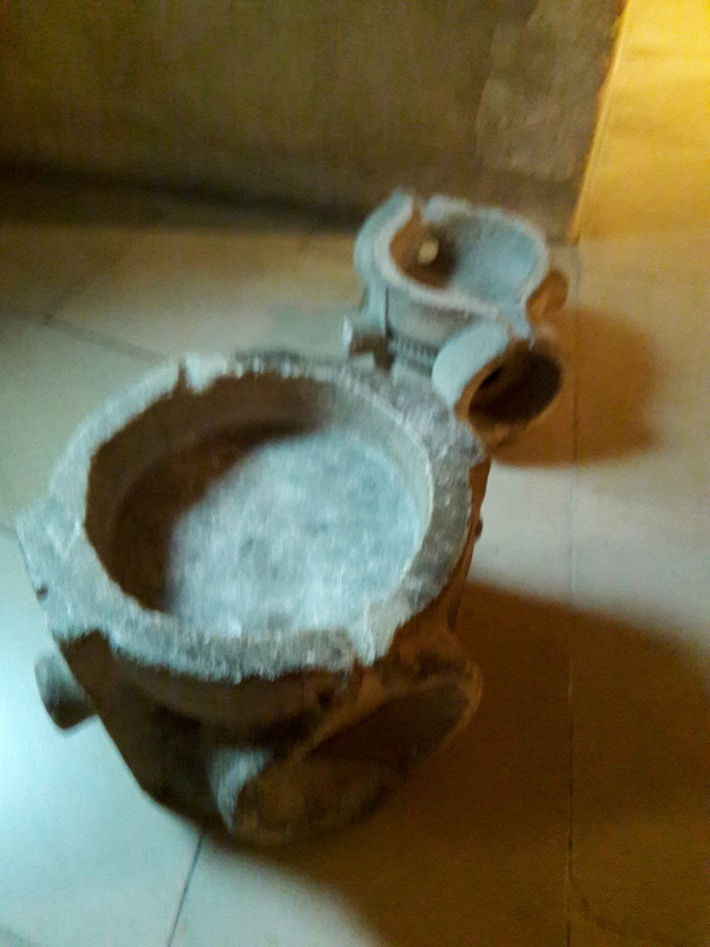 Mesures à sel utilisées par les agents de la gabelle. Palais Jacques Coeur, Bourges, France